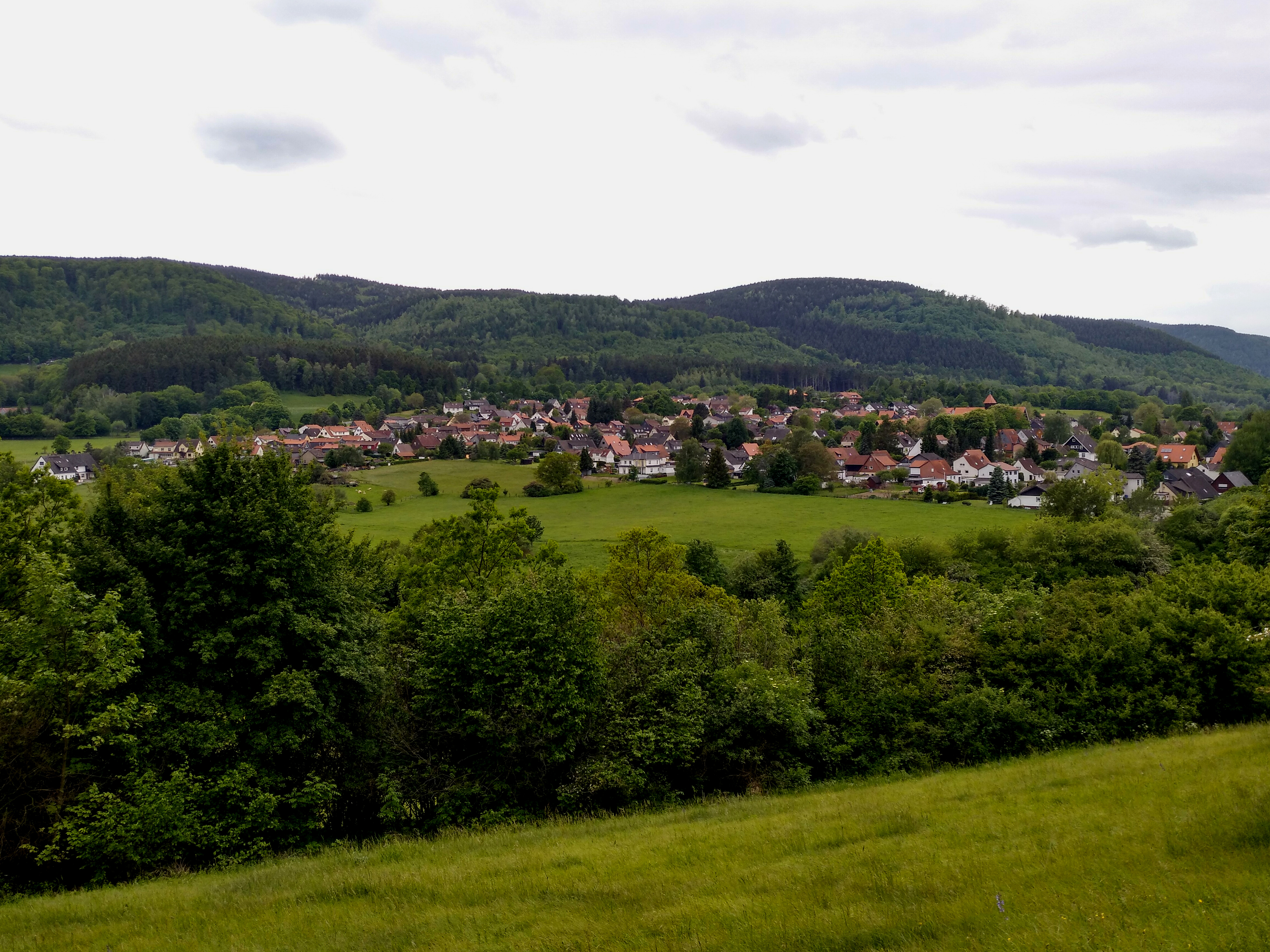 Göttingerode vom NSG Östlicher Langenberg aus